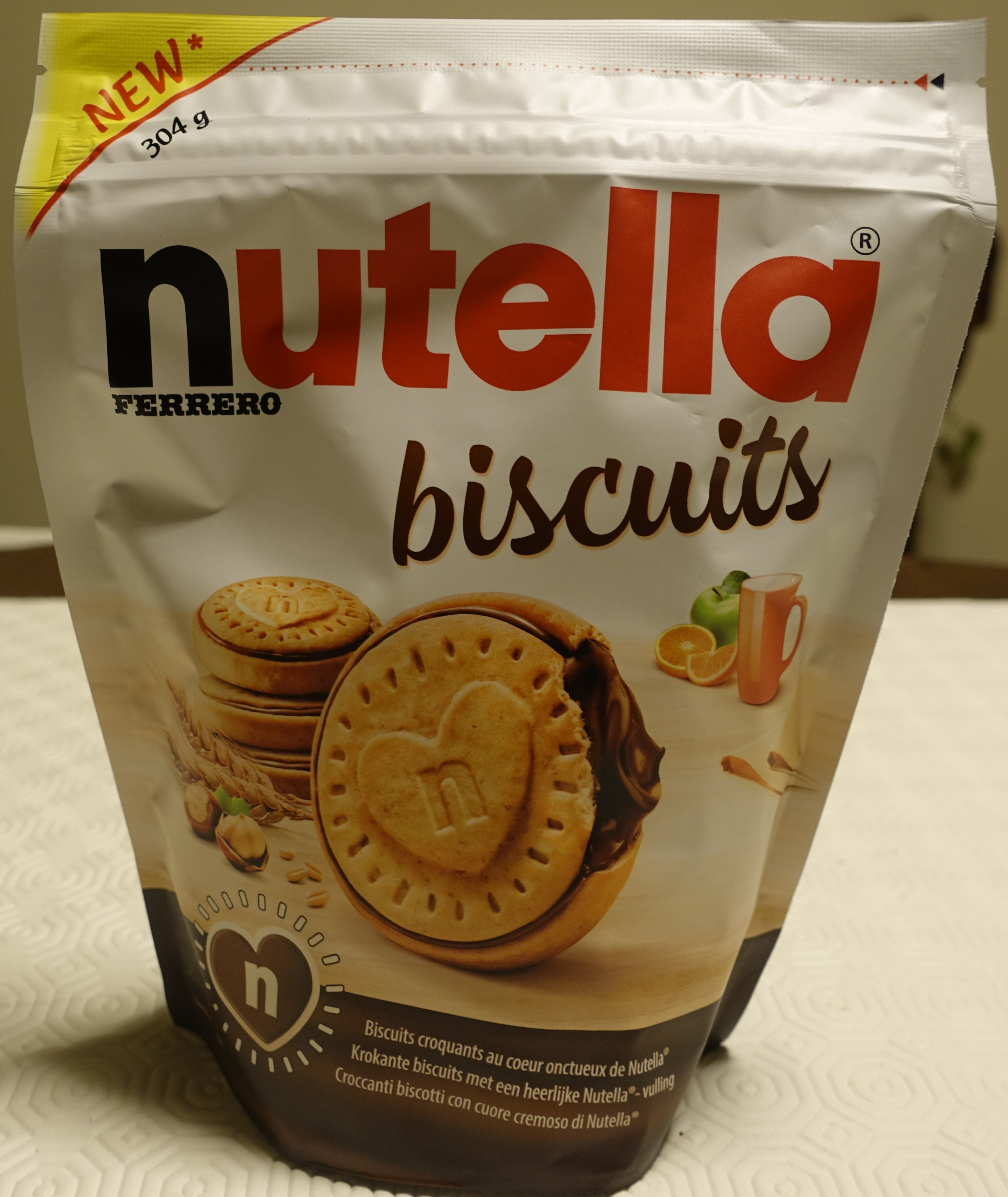 Confezione di Nutella Biscuits